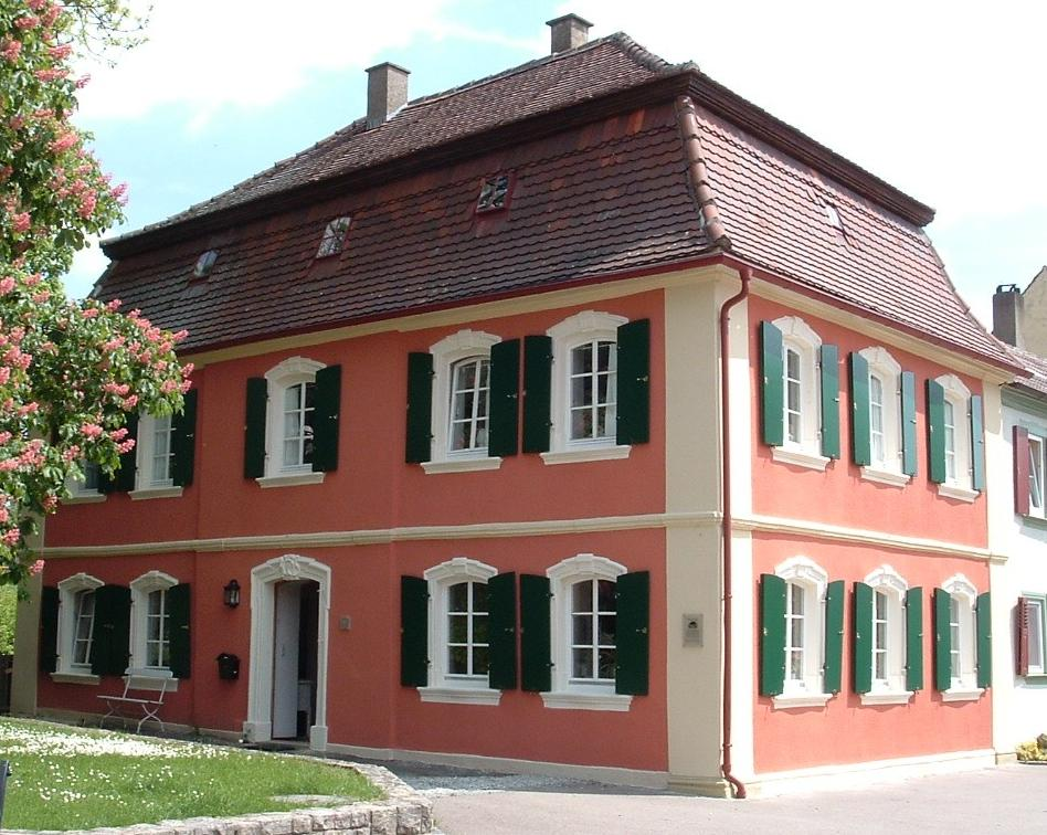 Bartenstein, Hofbaumeisterhaus. Erbaut um 1760 nach Plänen von Baudirektor Andrea Gallasini, der hier wohl in den letzten Jahren seines Lebens lebte. Sein Nachfolger, Hofbaumeister Wölfling, wohnte hier ab 1768.